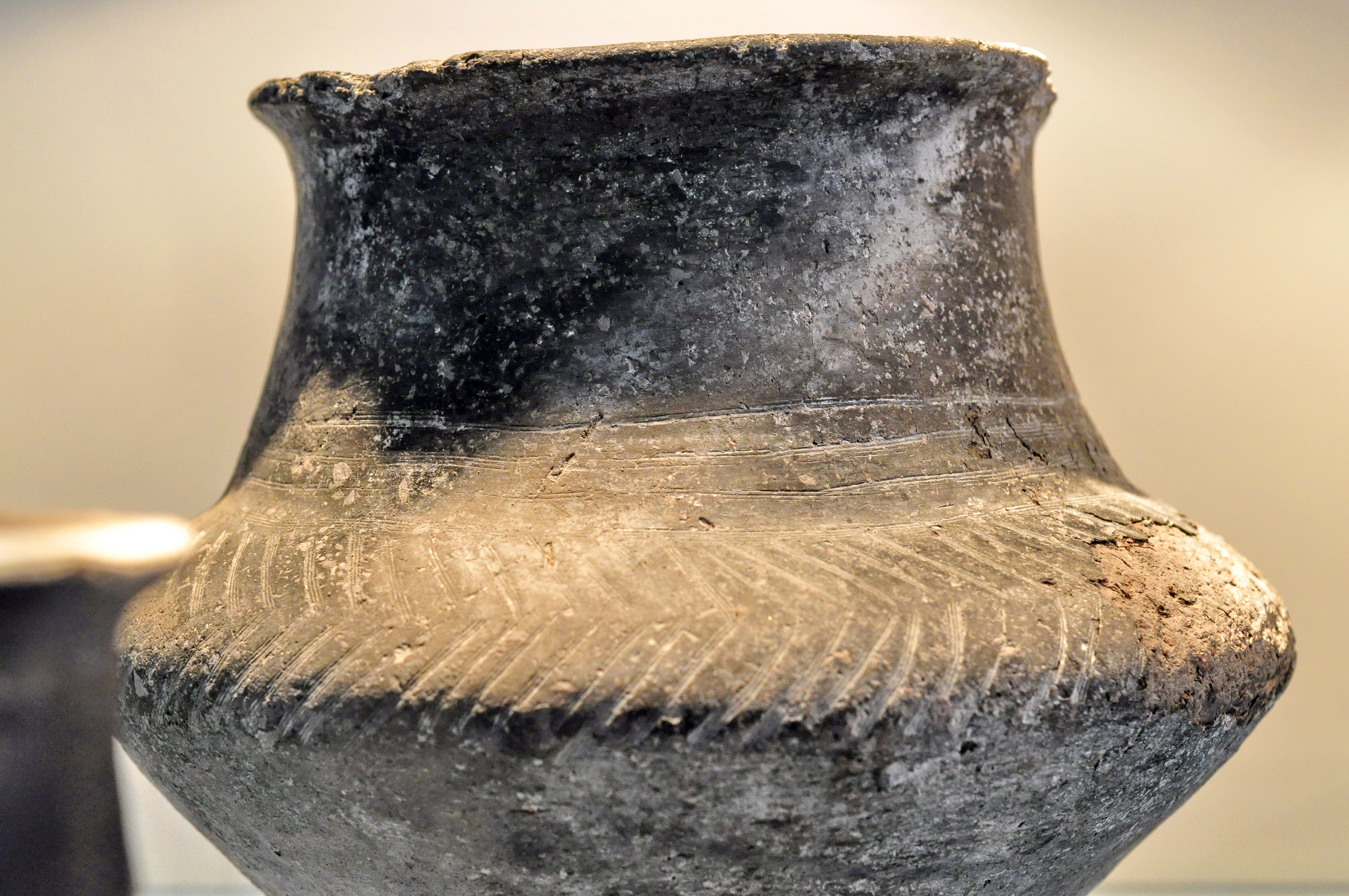 Storen, neolithische Seeufersiedlungen in Greifensee (Switzerland)